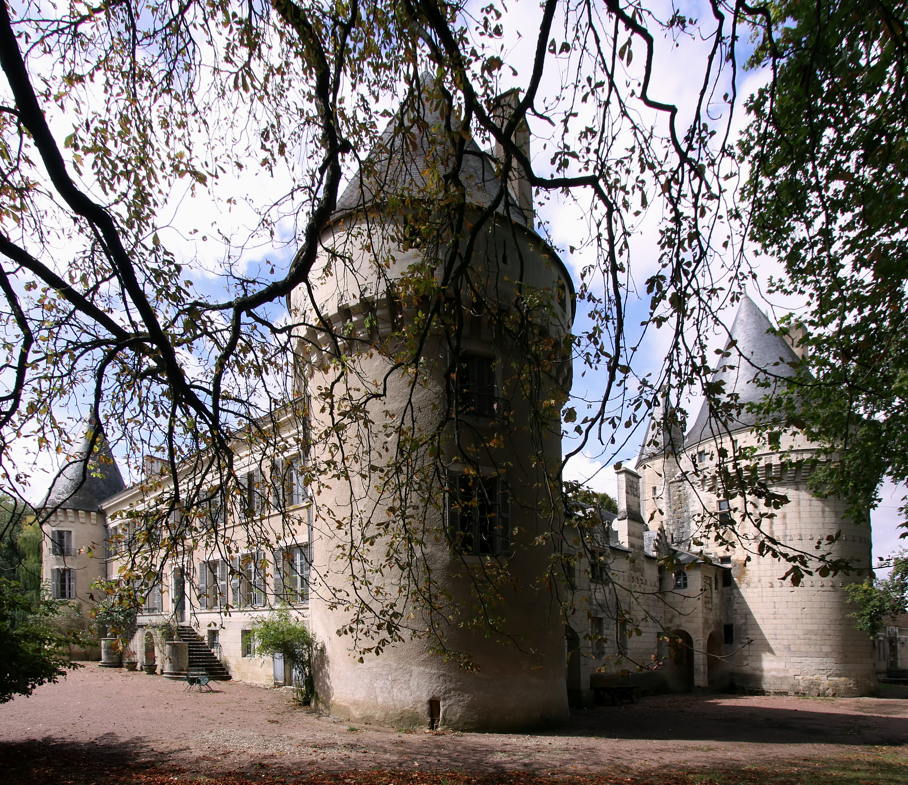 Schloss Argy in französischen Departement Indre - Außenansicht